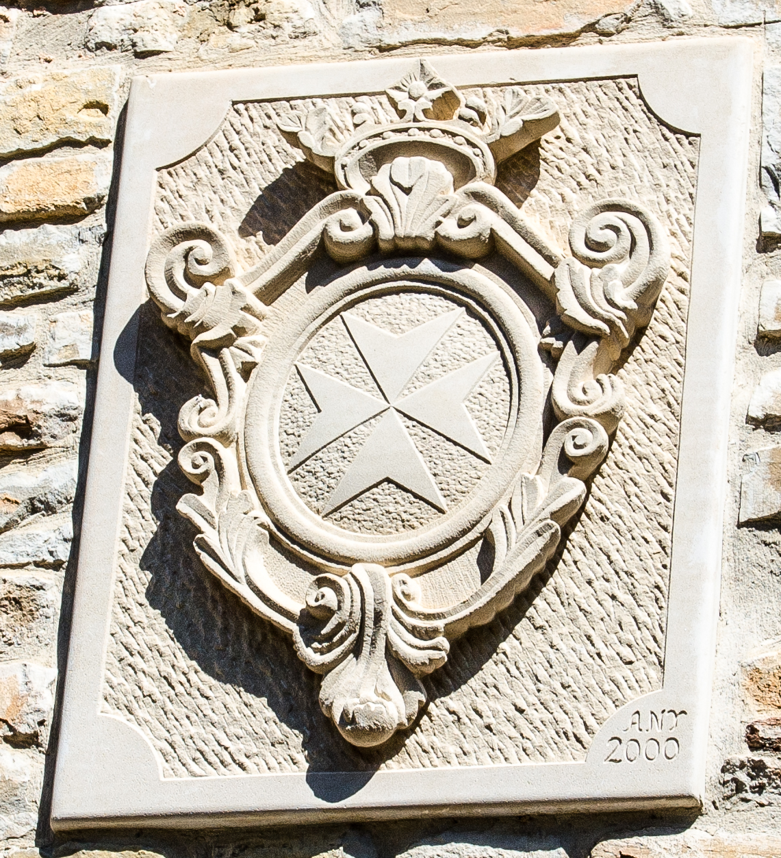 Palau de Noguera. Escudo. Año 2000.